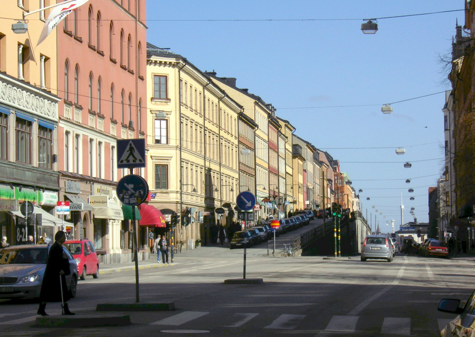 Hornsgatan (med "Puckeln") på Södermalm i Stockholm